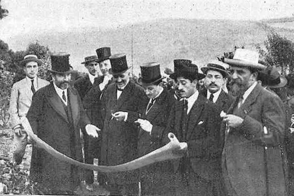 inauguracion del primer chalet de la futura Ciudad Jardin, San Andres de Palomar, 1915